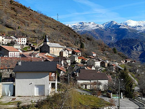 vue generale du village de larcat